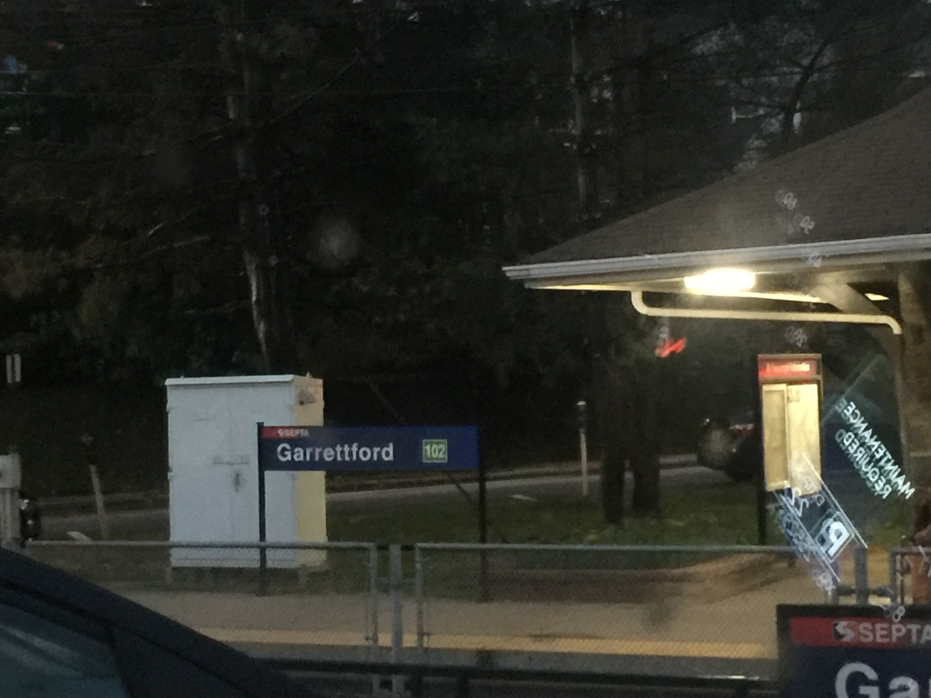 Garretford station